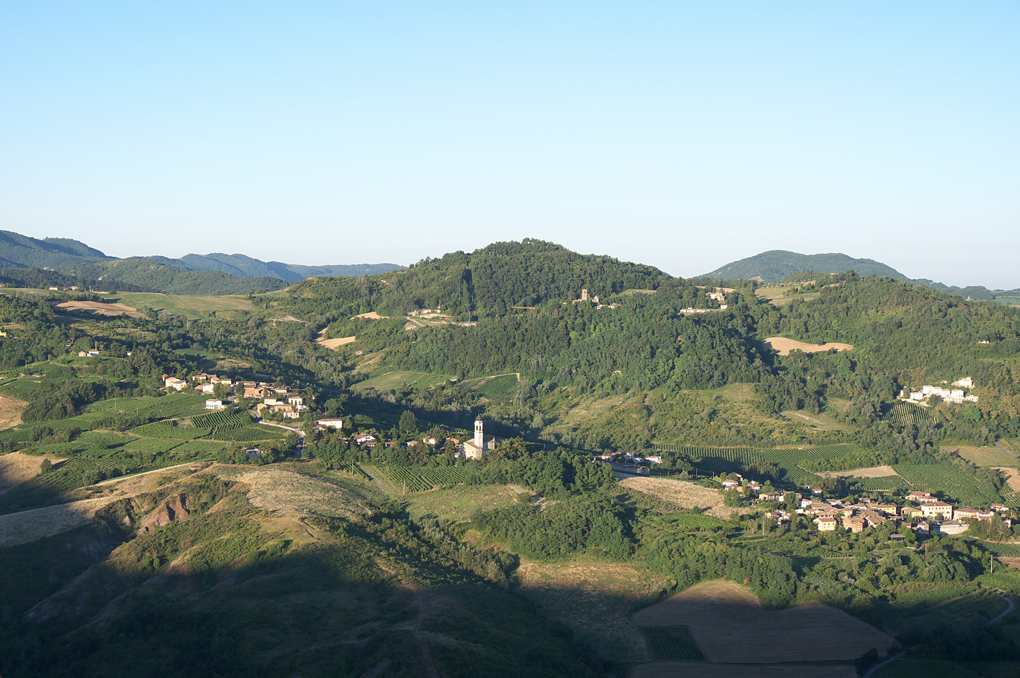 Borgoratto Mormorolo dalla Costa Pelata